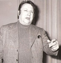 L'humoriste français d'origine belge Raymond Devos dans les années 1980.